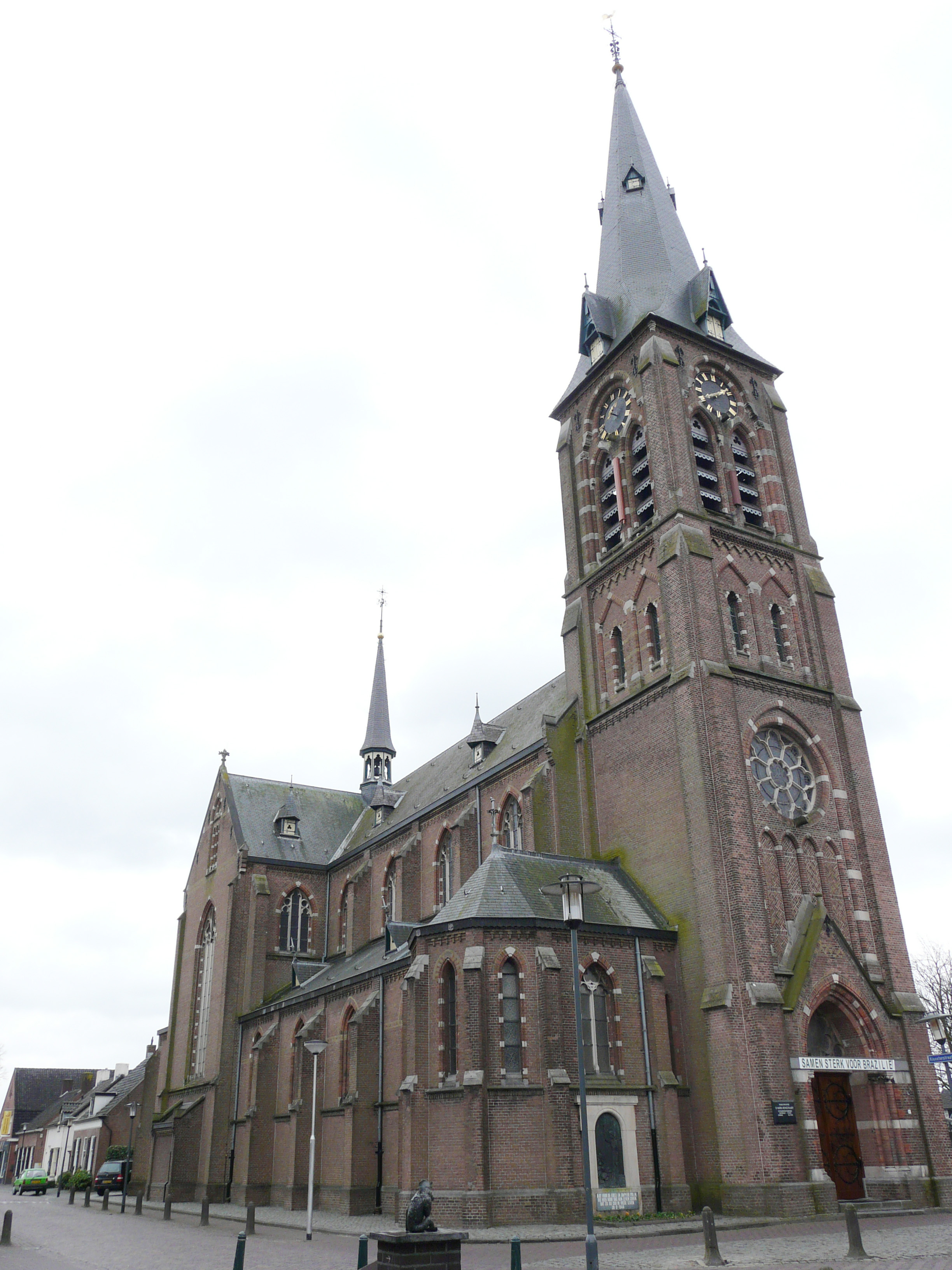 Zicht op een deel van de H. Maria Hemelvaartkerk gevestigd aan de Brigidastraat 1 in het centrum van Bavel